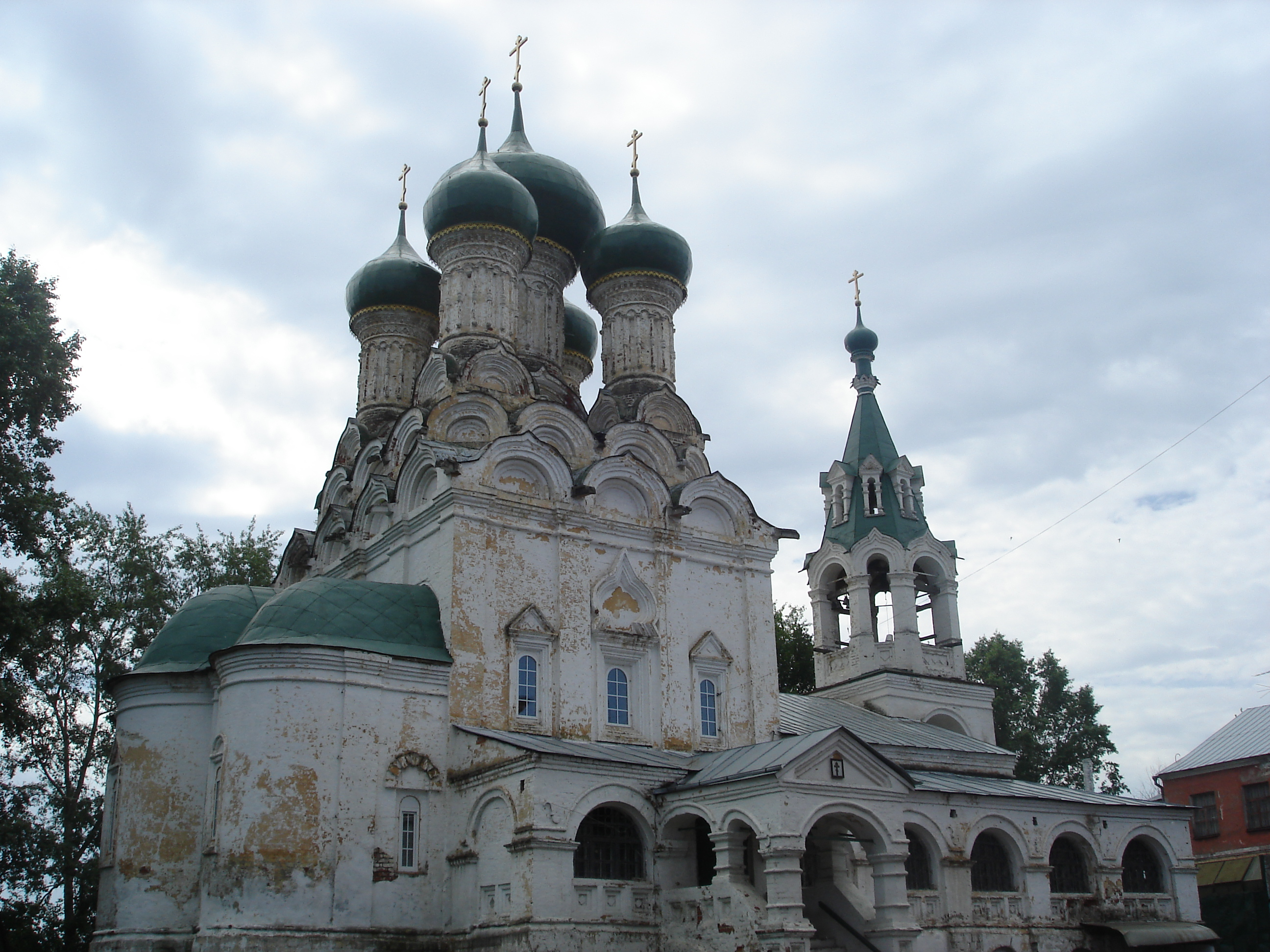 Владимир. Богородице-Успенская церковь